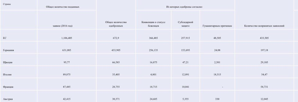 Показатели принятых и отказанных заявление о предоставлении убежища беженцам (2016)